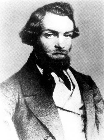 Stephan Born Revolutionär 1848/49